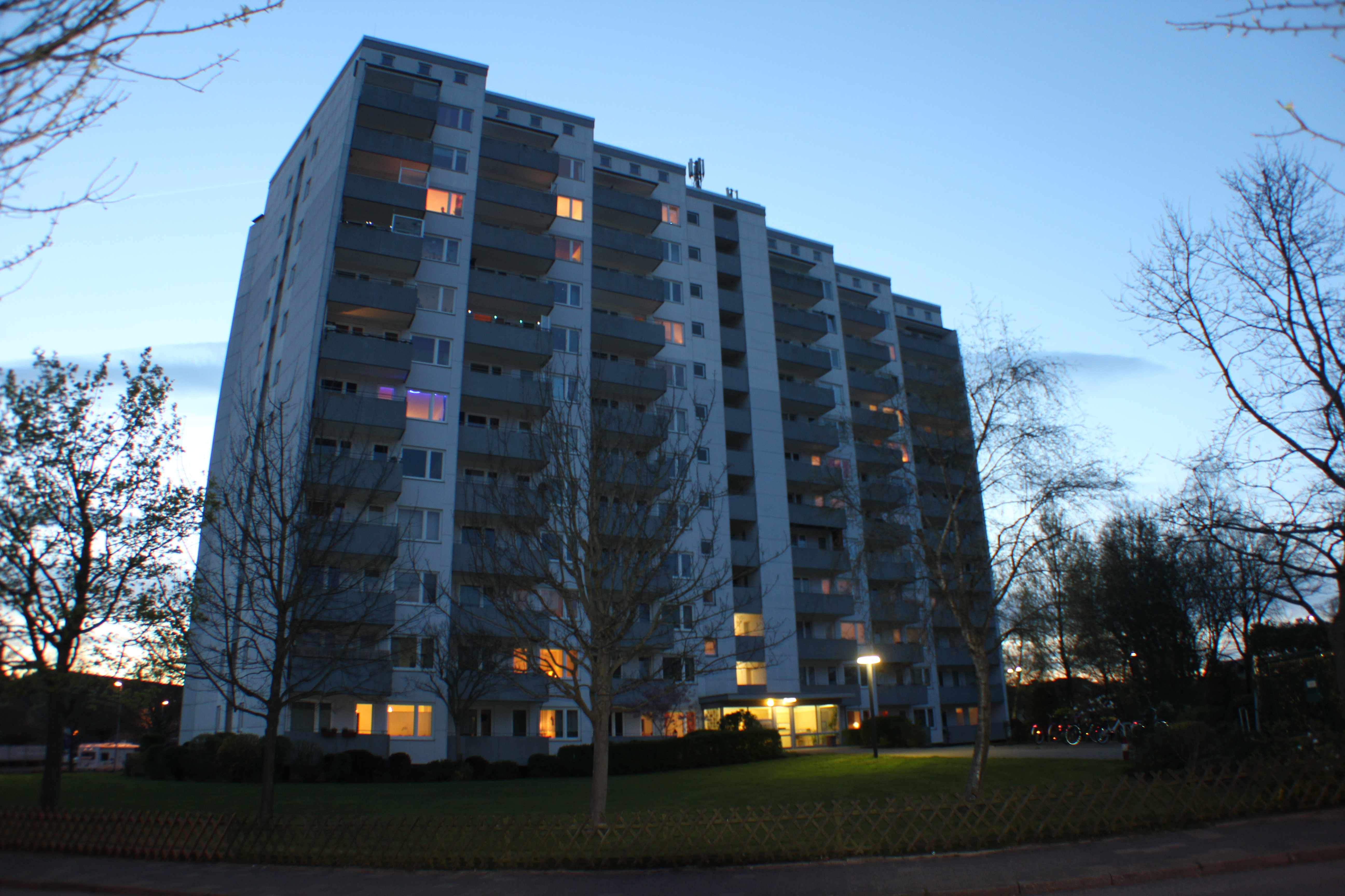 Hochhaus Brahmstraße 1, Flensburger Musikerviertel 2014-04-16, Bild 05